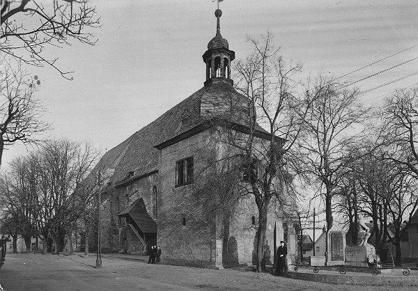 Außenaufnahme der Stadtkirche St. Peter & Paul in Weißensee/Thüringen mit Glockenturm. Aufnahme aus dem Jahre 1920.